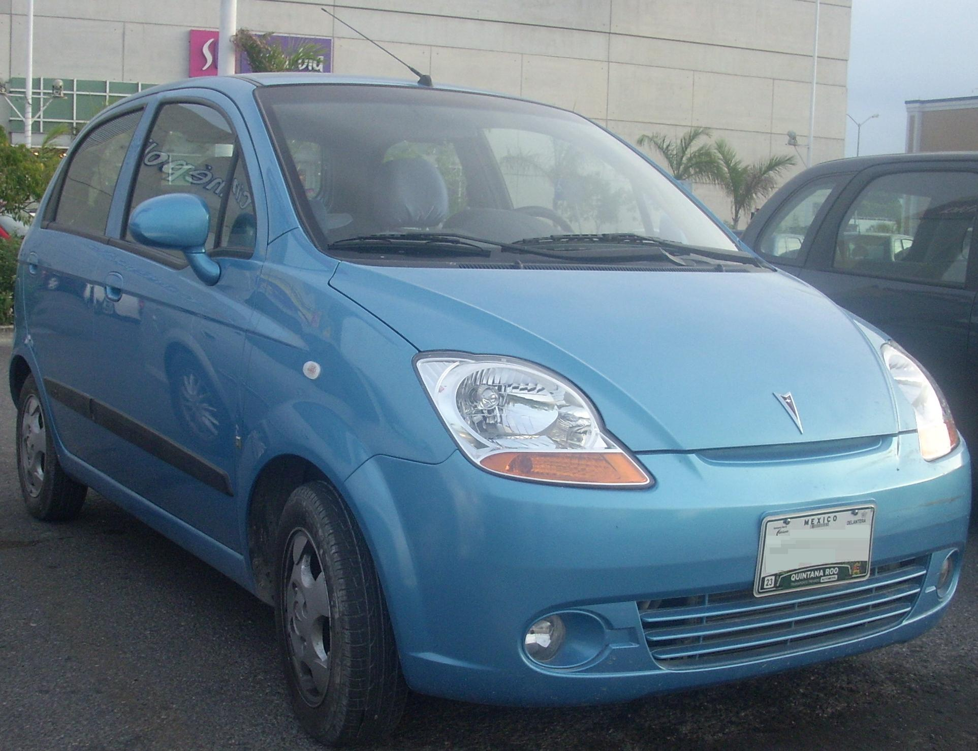 2007-2010 Pontiac Matiz G2 photographed in Cancun, Quintana Roo, Mexico.